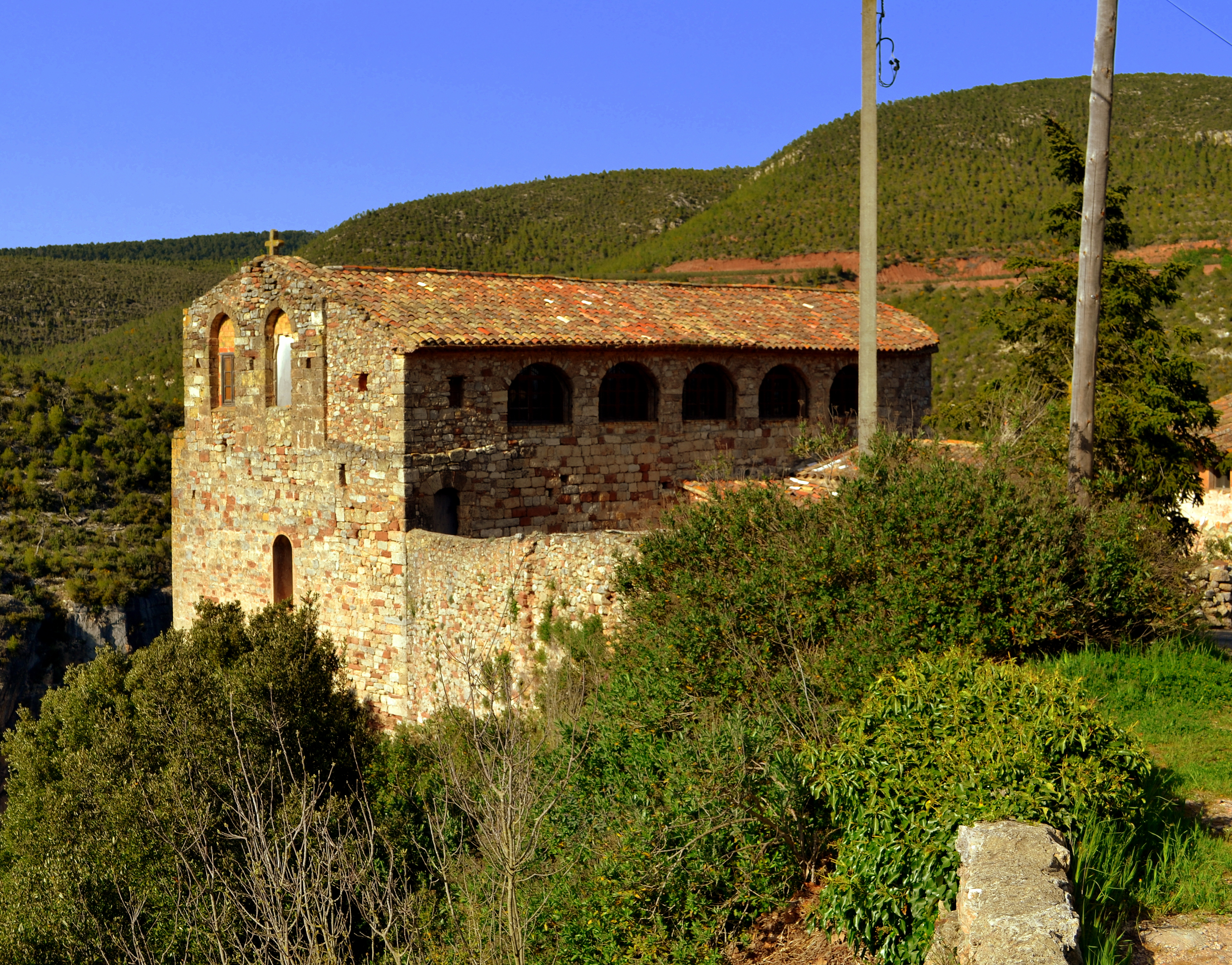 Església castell de Mediona, el Penedes, Barcelona